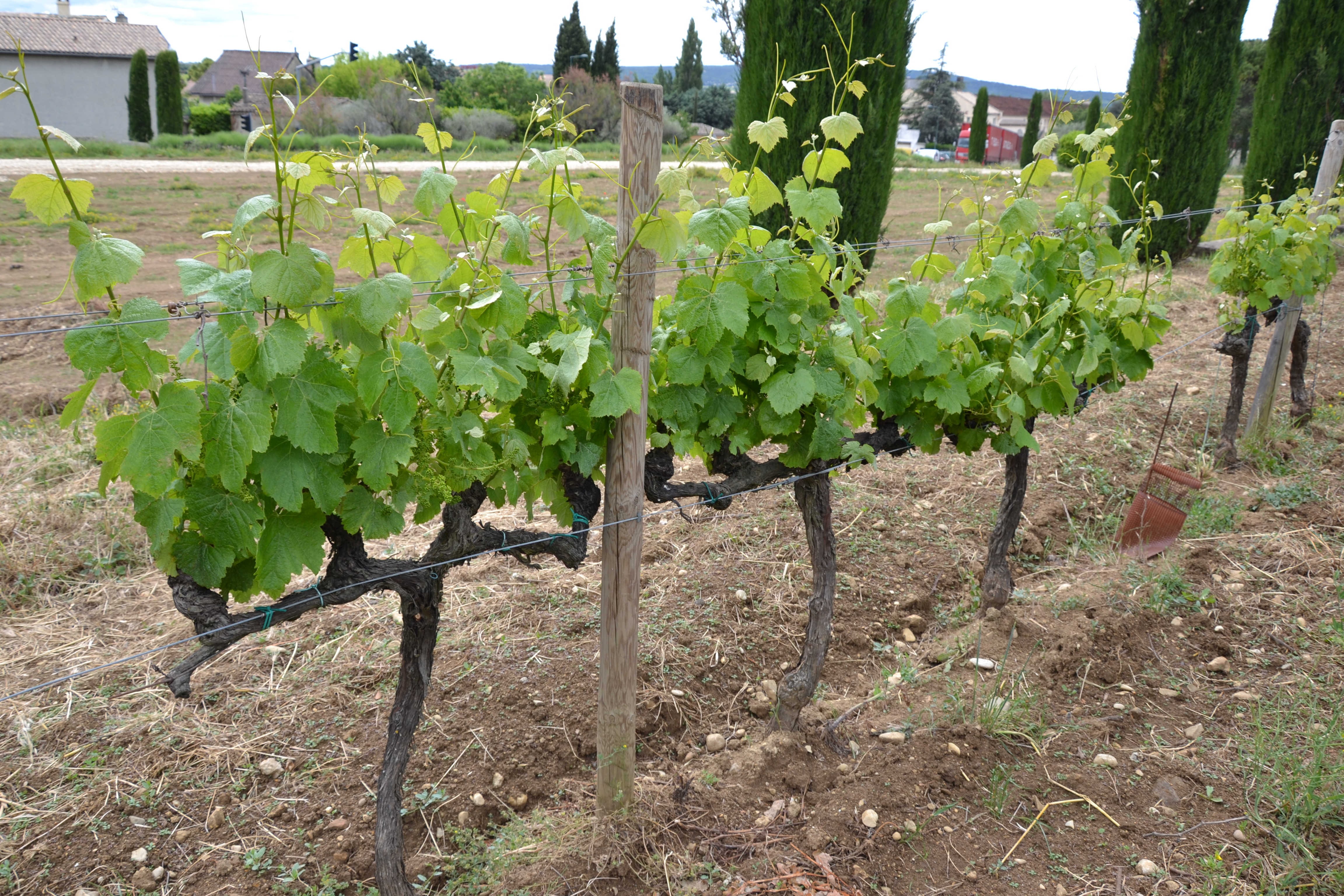 cep de cépage cot, aussi appelé Malbec